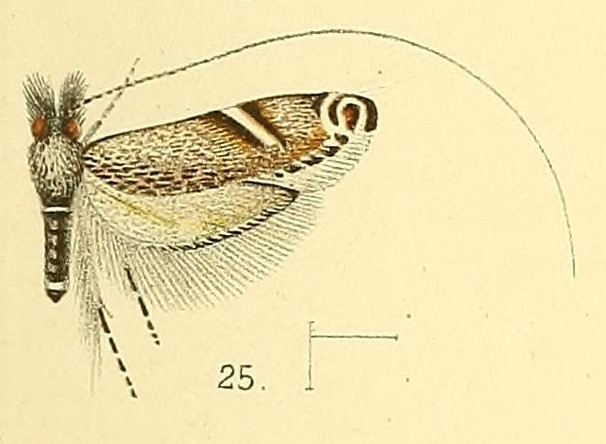 Adela cuneella